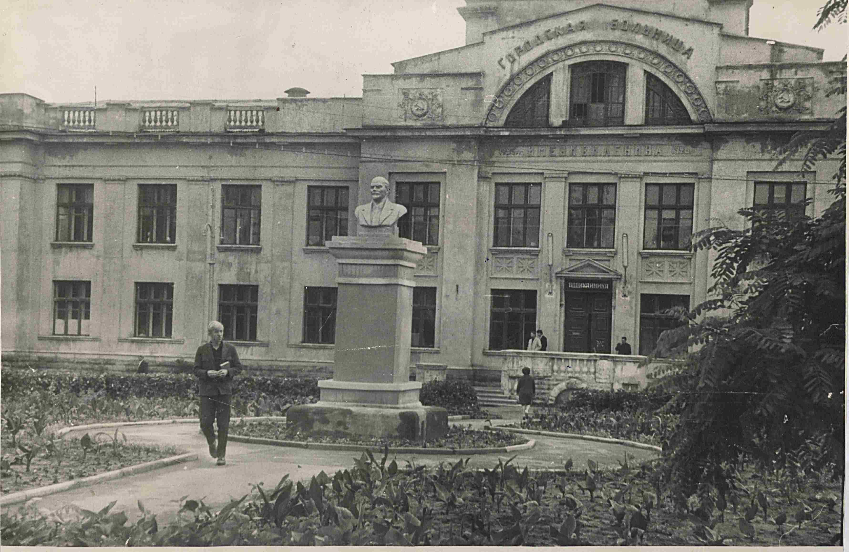 Город Шахты. Памятник В. И. Ленину у горбольницы (1920-1930г.г.)